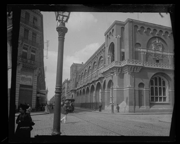 Musée des Augustins, au carrefour des rues de Metz et d'Alsace-Lorraine. Juillet 1905. Vue du bâtiment faisant angle prise au carrefour des deux voies. Aile Darcy du musée ; lampadaire.